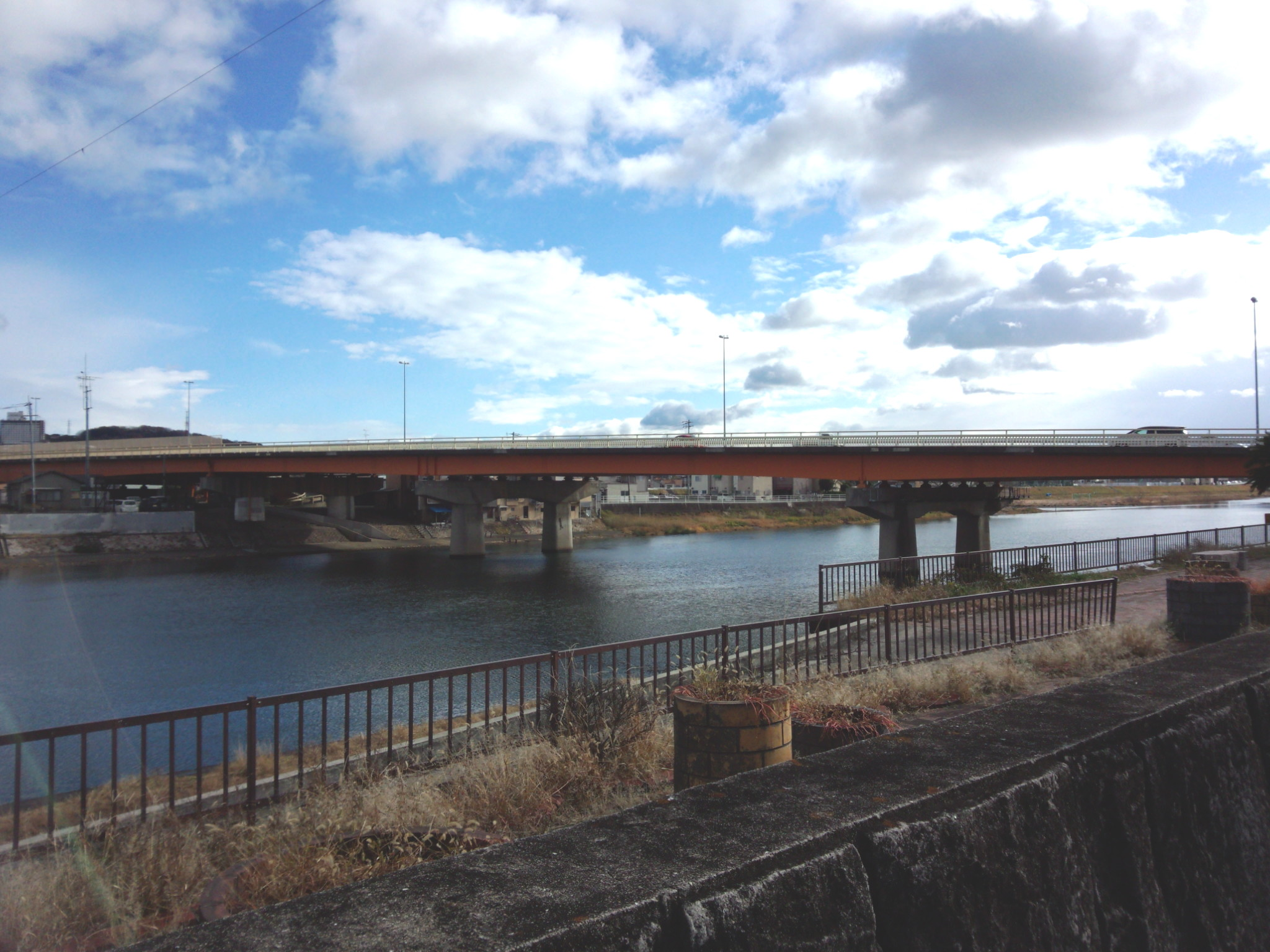 岡山市にある新京橋（全体）